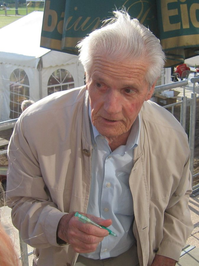 Ottmar Walter bei einem Benefiz-Fußballspiel in Obersülzen